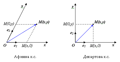 llustration of the difference between affine and Cartesian coordinates systems. Илюстрация на разликата между афинна и Декартова координатна системи